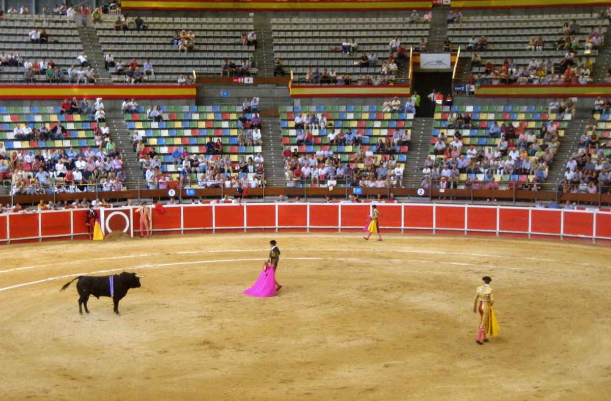 Touradas no Coliseum da Coruña no verán de 2012